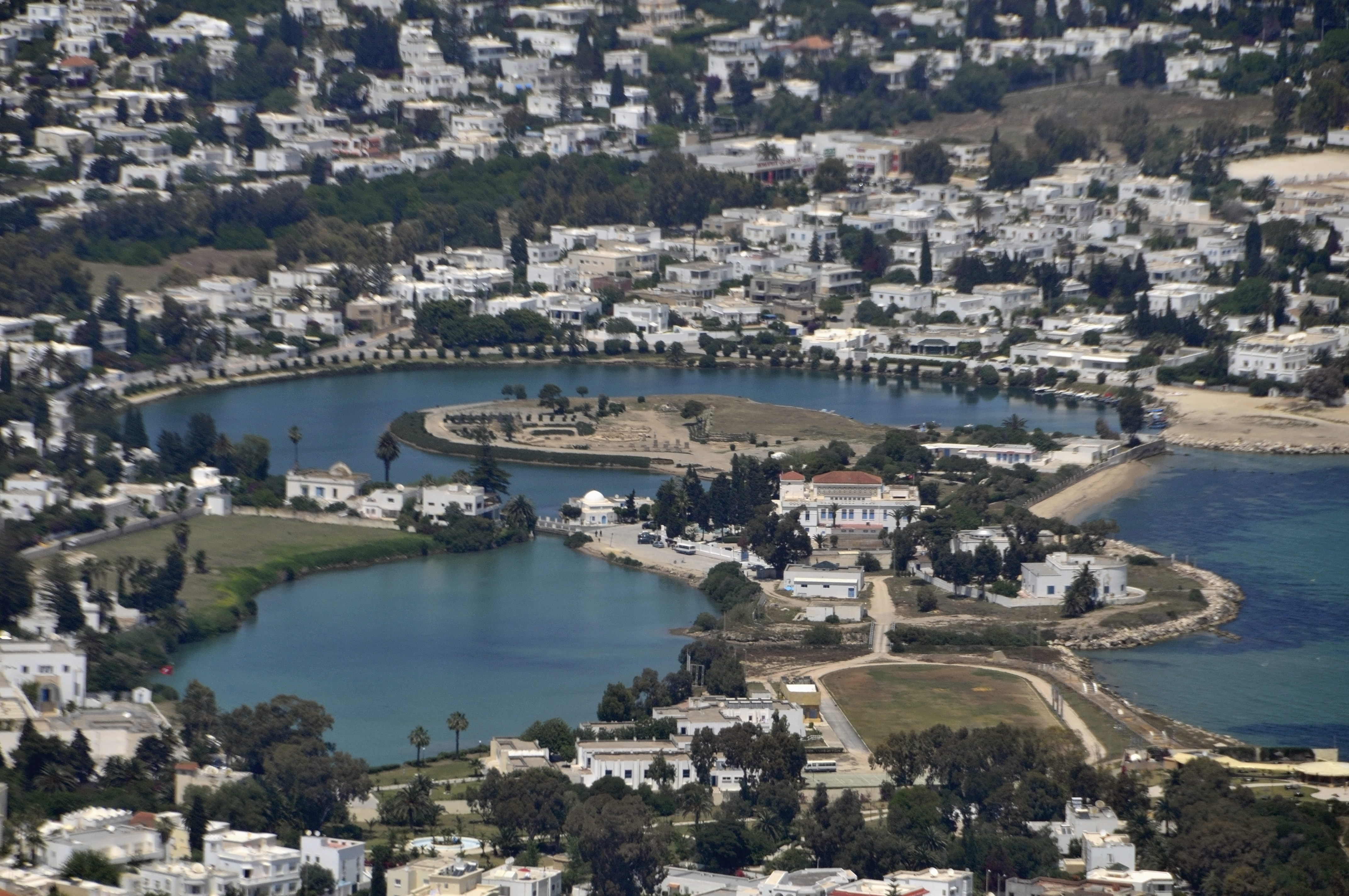 Vue aérienne des ports puniques à Salambo, banlieue nord de Tunis